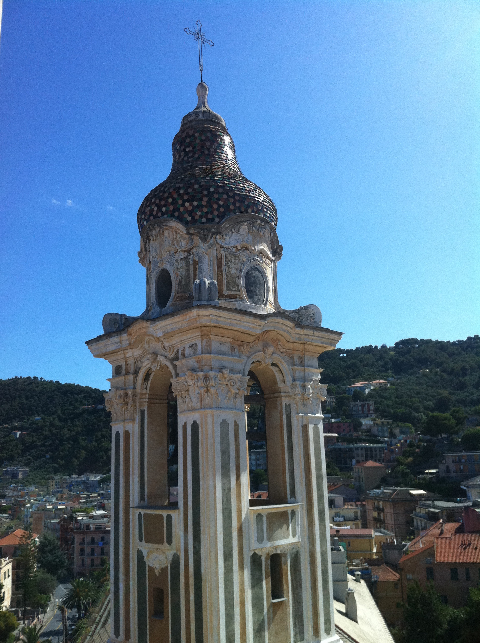 Campanile della Chiesa parrocchiale di San Matteo This is a photo of a monument which is part of cultural heritage of Italy.